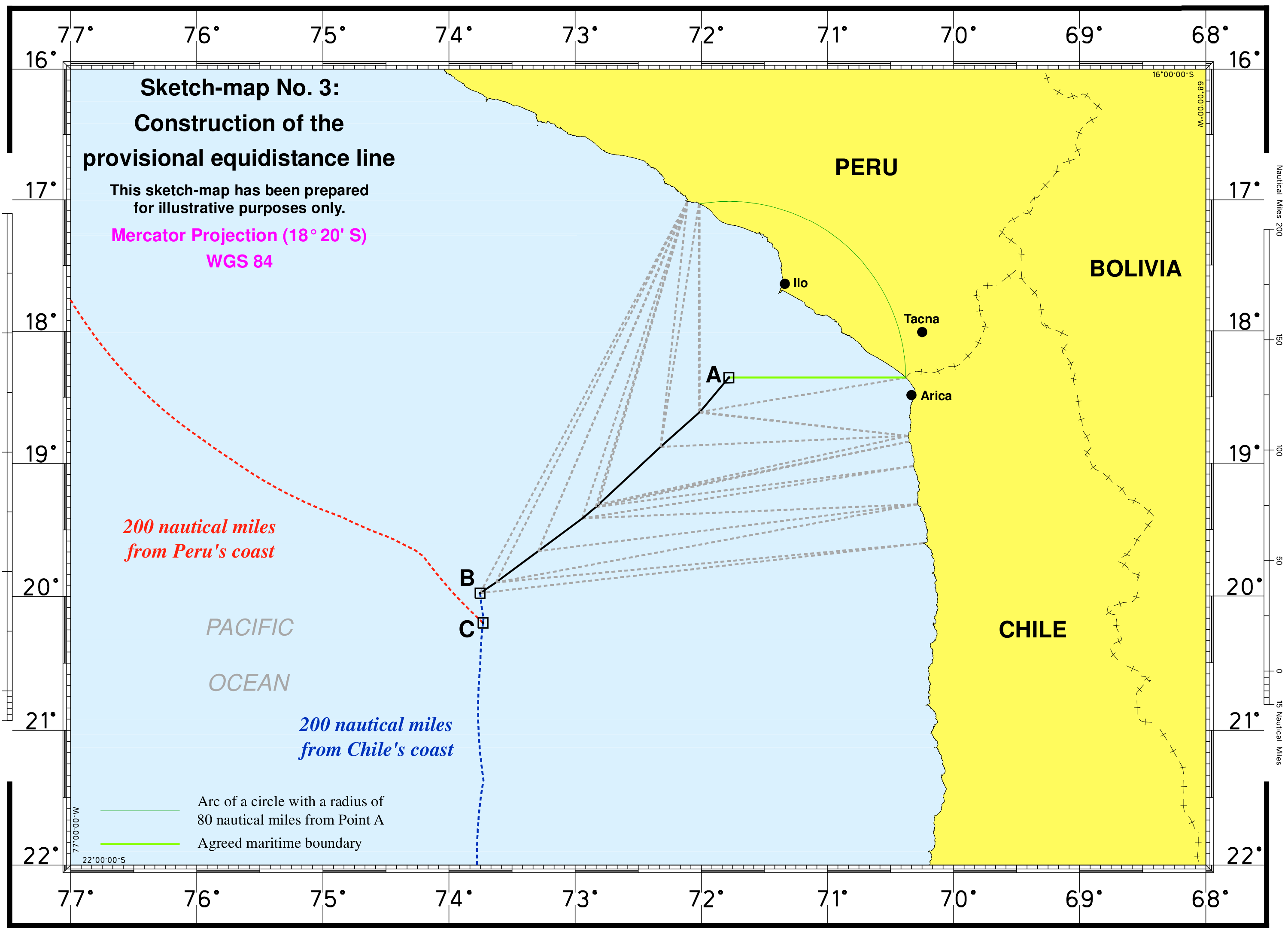 Mapa esquemático número 3 de la sentencia del 27 de enero de 2014 de la Corte Internacional de Justicia sobre la disputa de la frontera marítima entre Perú y Chile.